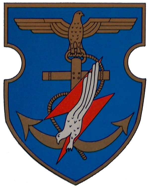 Wappen des Nachtjagdleitschiffes Togo